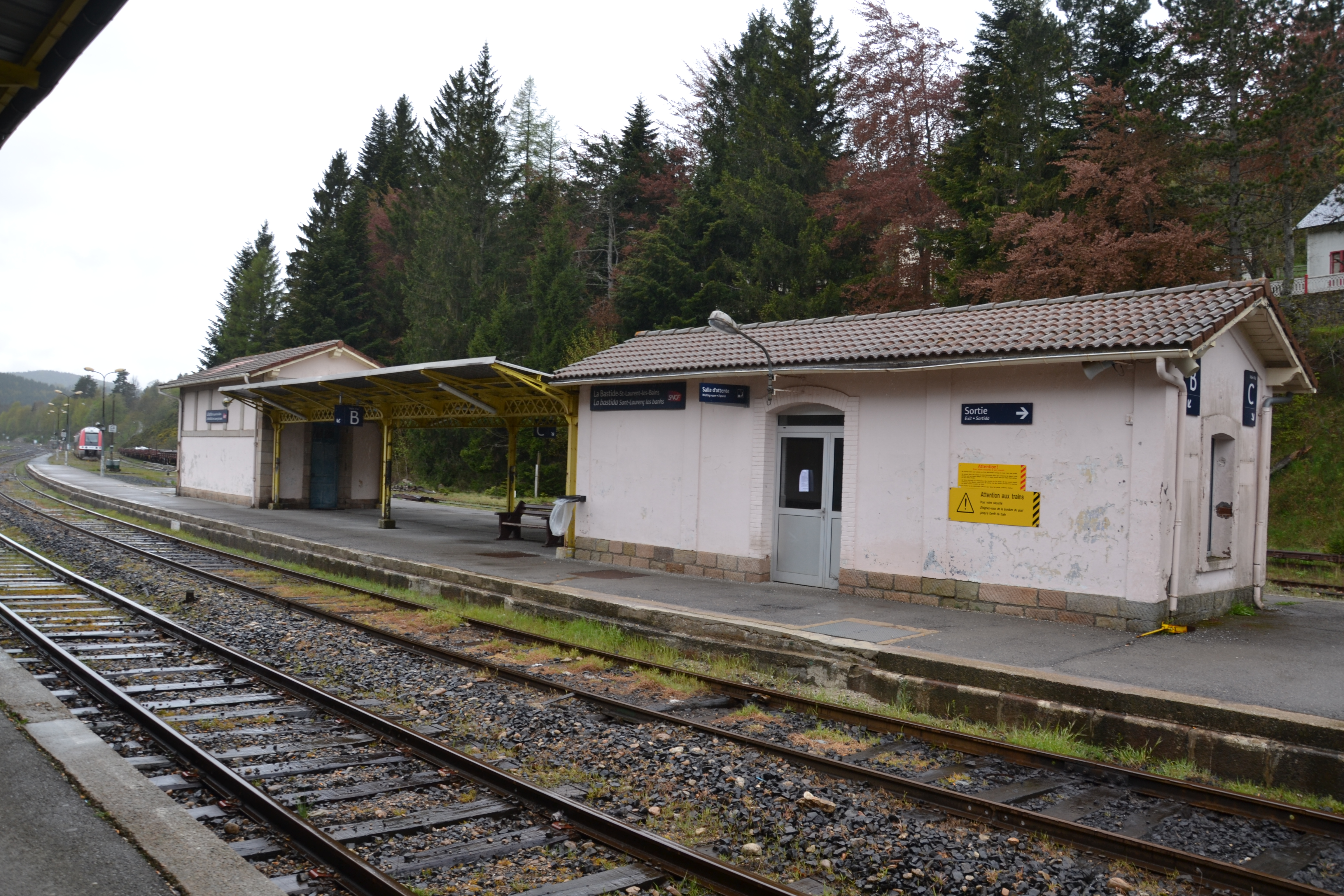 Installation en gare